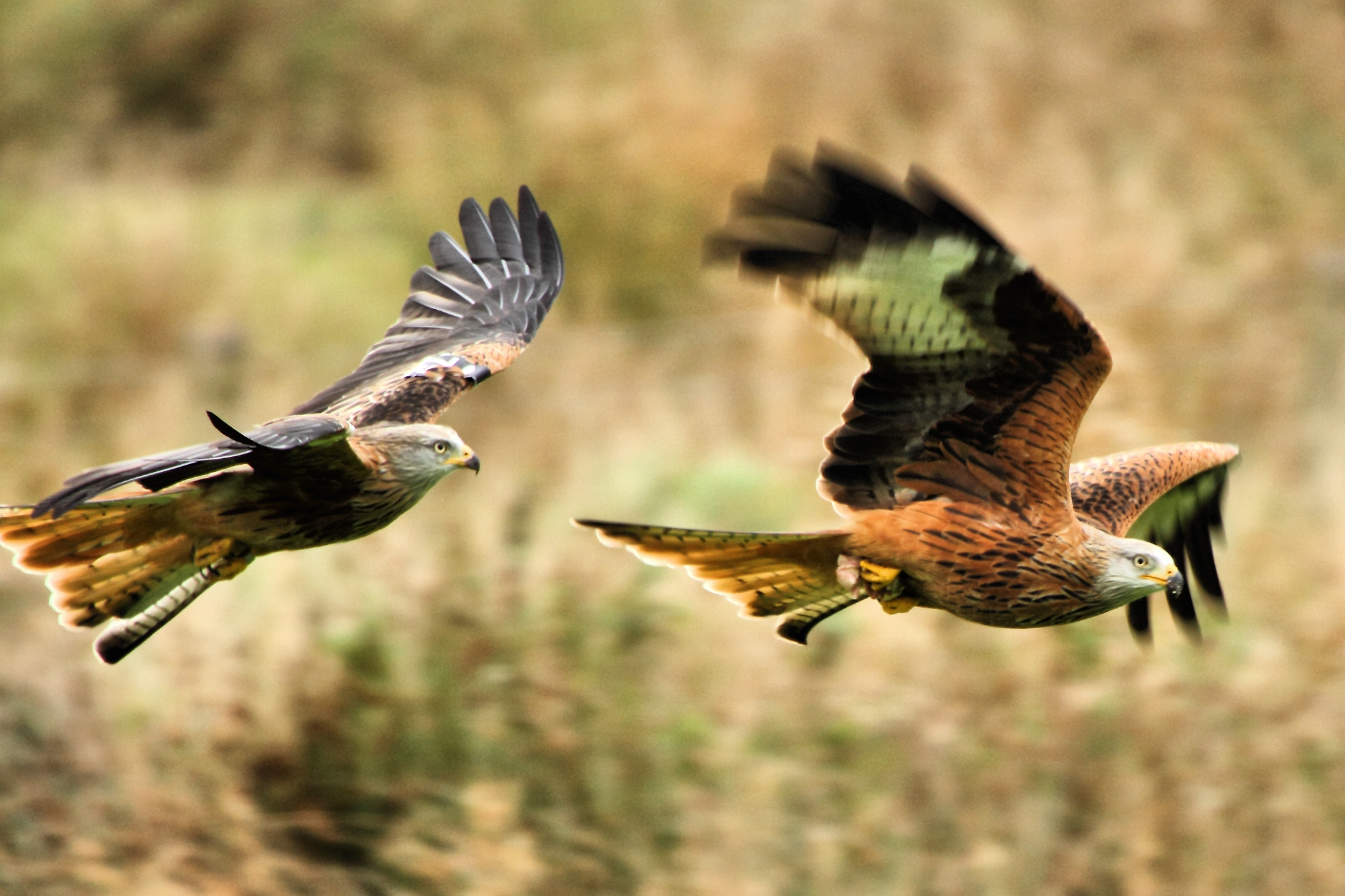 Red Kites - Gigrin Farm Wales